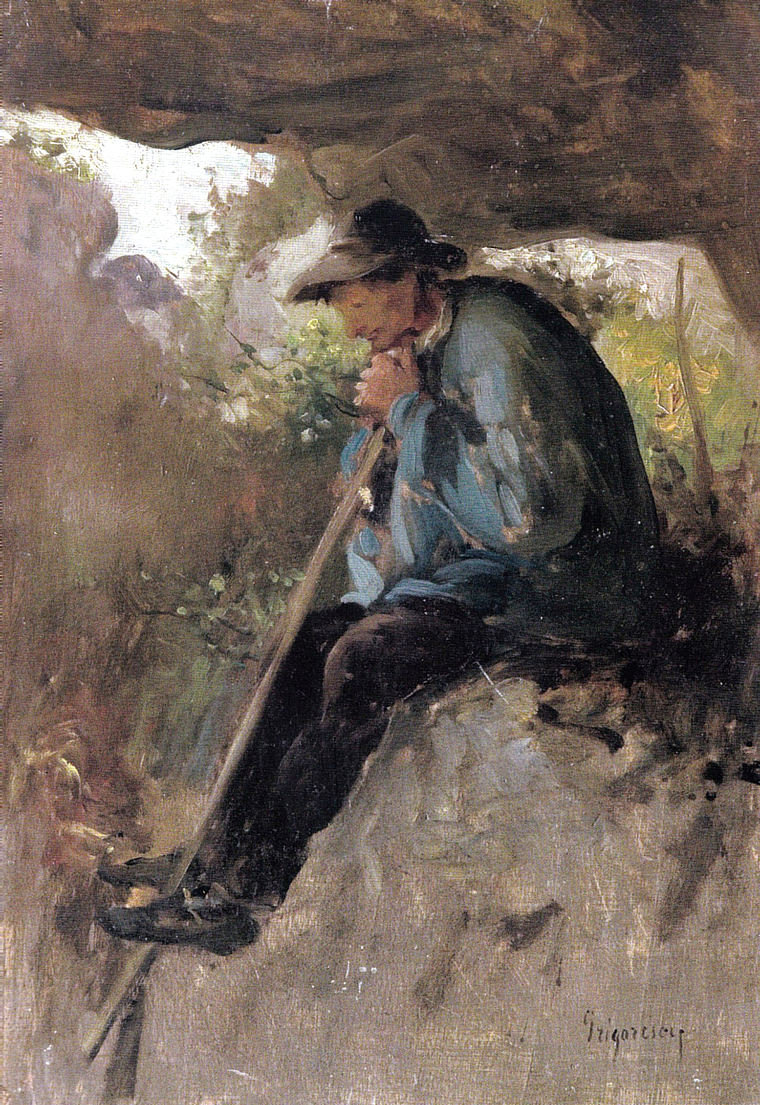 Lucrător la Fontainebleau, ulei pe lemn - Galeria de Artă Românească Modernă de la Muzeul Național de Artă al României